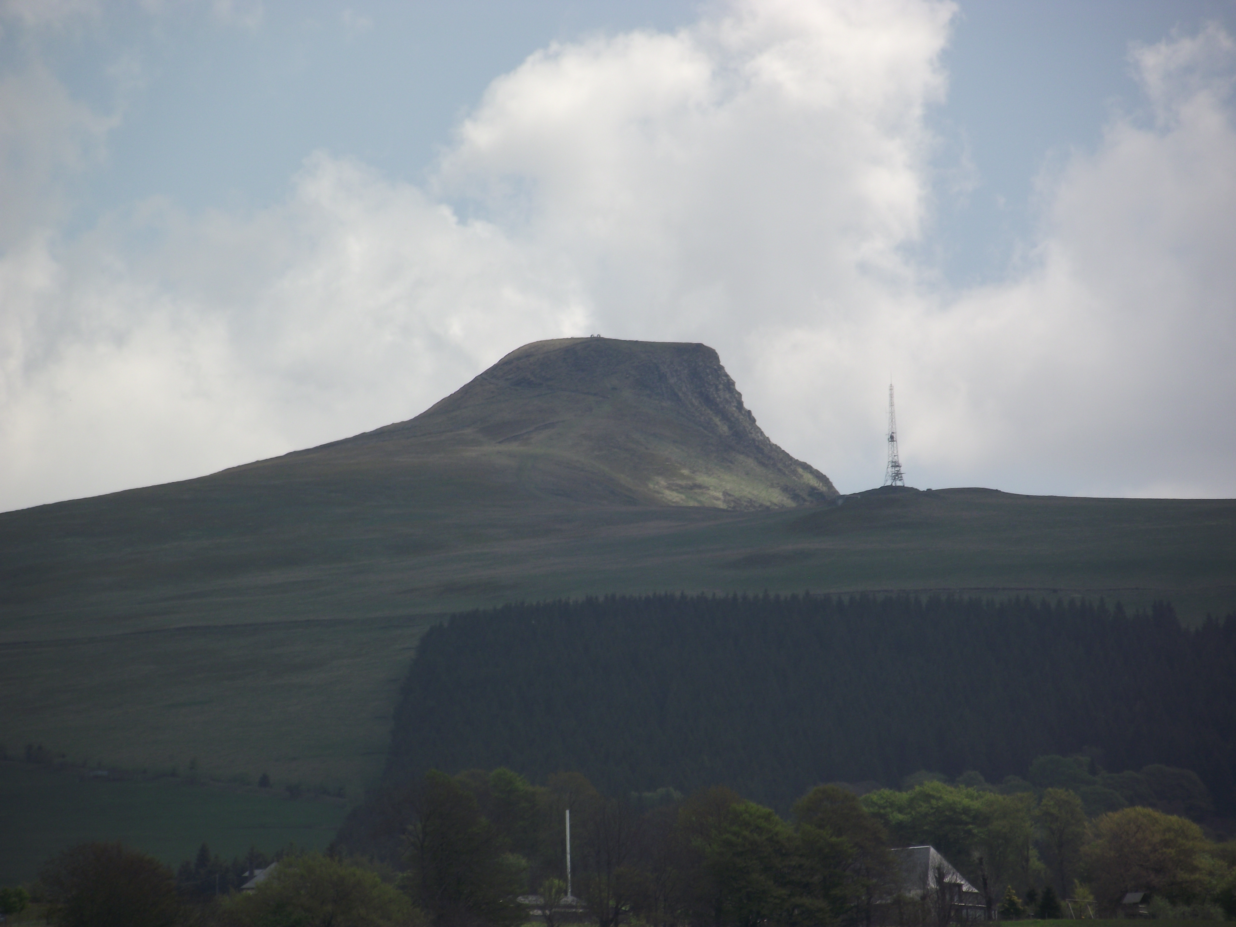 La Banne d'Ordanche (1519 m) vue de l'ouest (environ de Laqueuille).